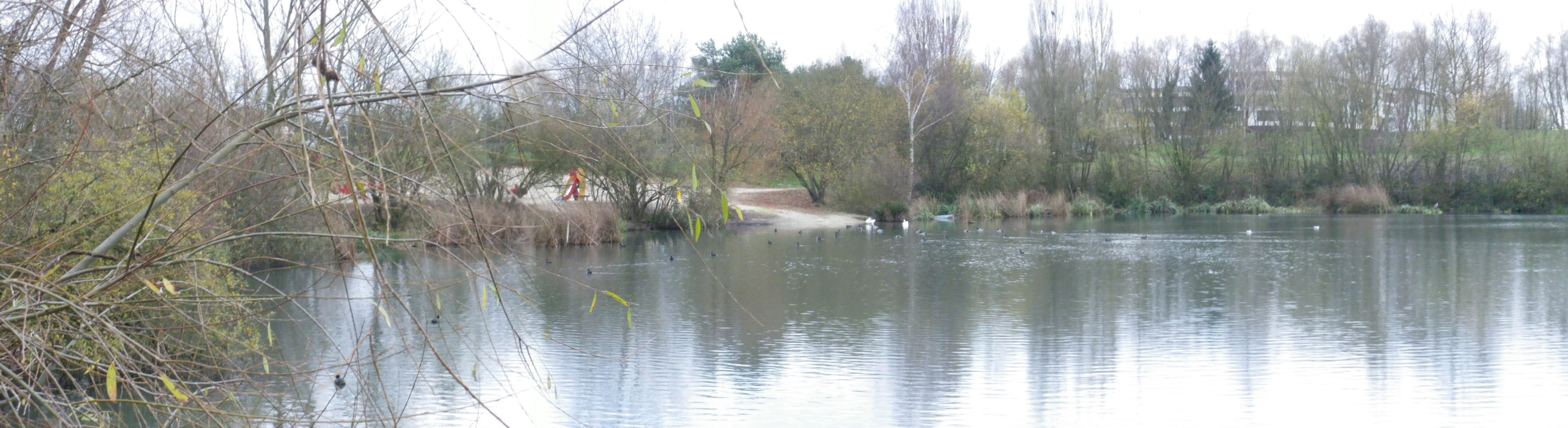 Parc Nord, les Ulis, France